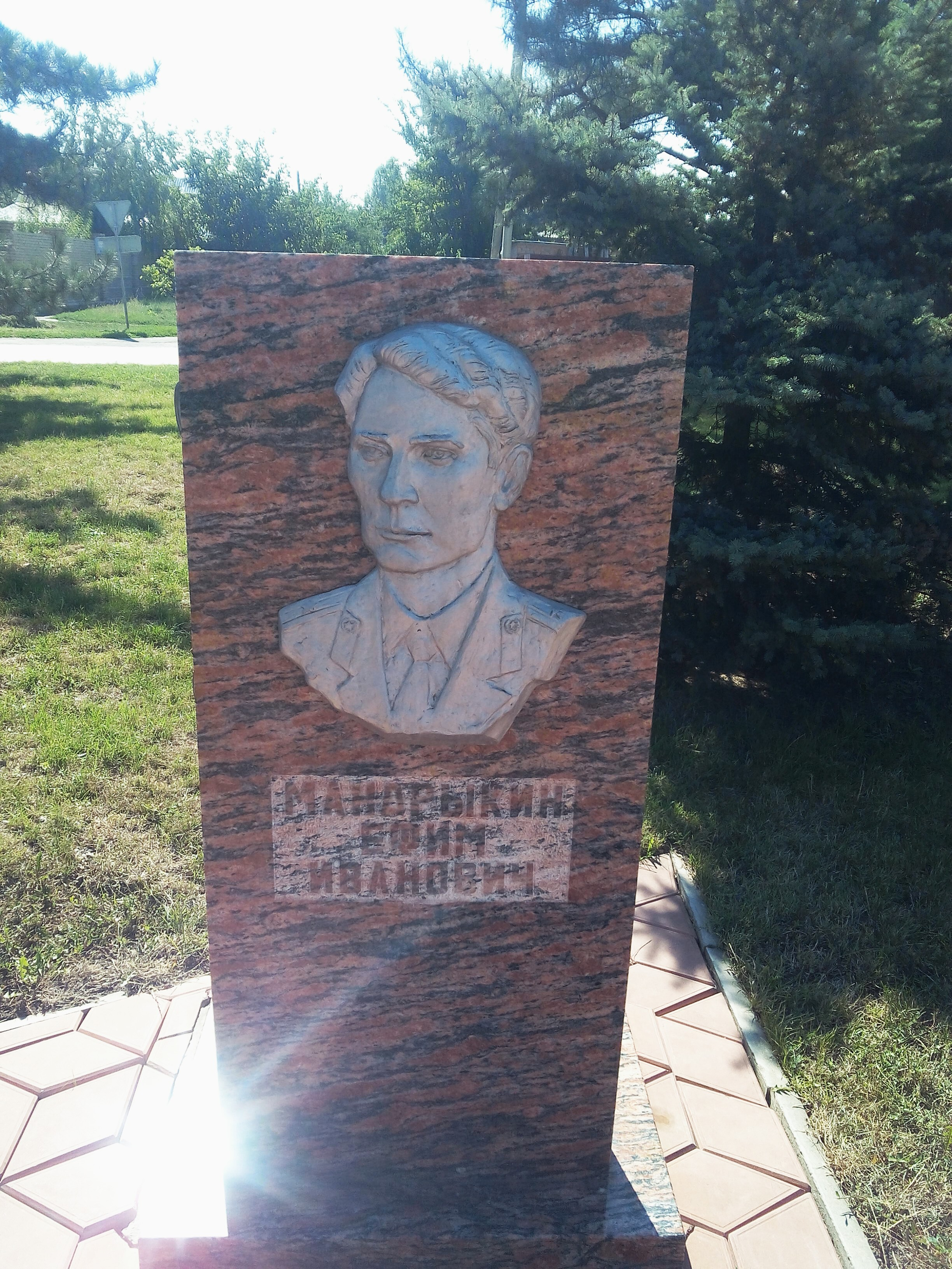 г. Сальск, пл. Свободы, Памятная стела с барельефом Мандрыкина Е.И. на Аллее Героев